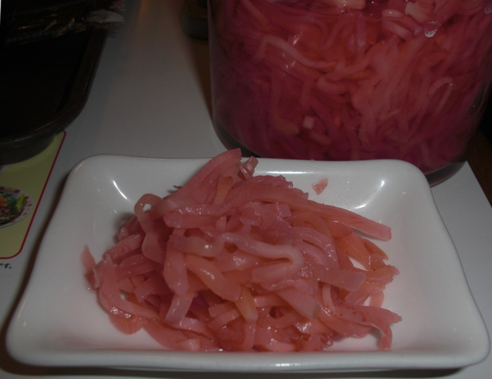 Beni shōga (紅しょうが)